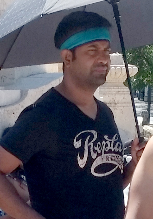 L'actor de cinema telugu Vennela Kishore. Esperant al començament del rodatge d'una escena al Pont del Real de València.